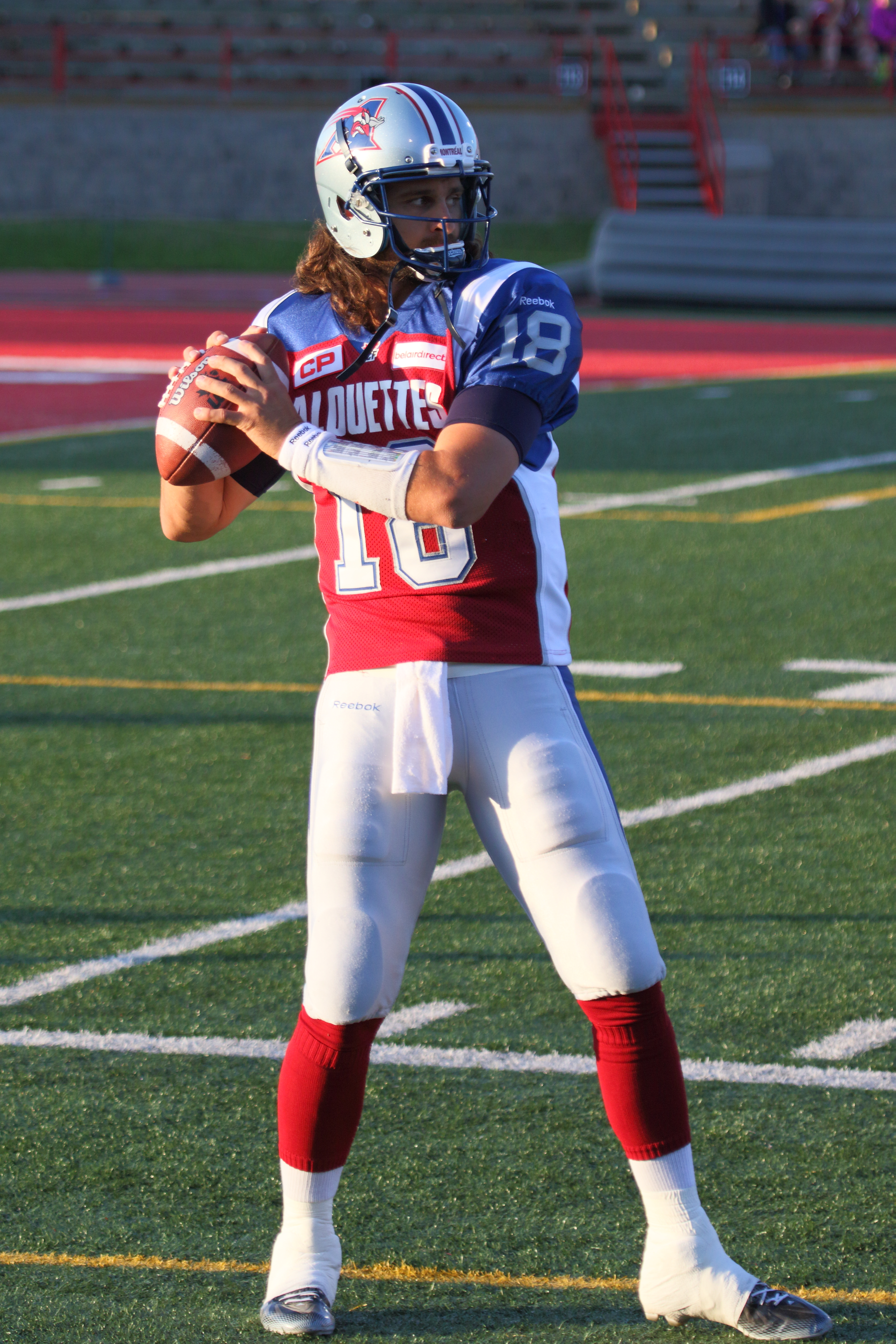 Jonathan Crompton, Alouettes de Montréal, lors d'un match préparatoire contre le Rouge et Noir d'Ottawa